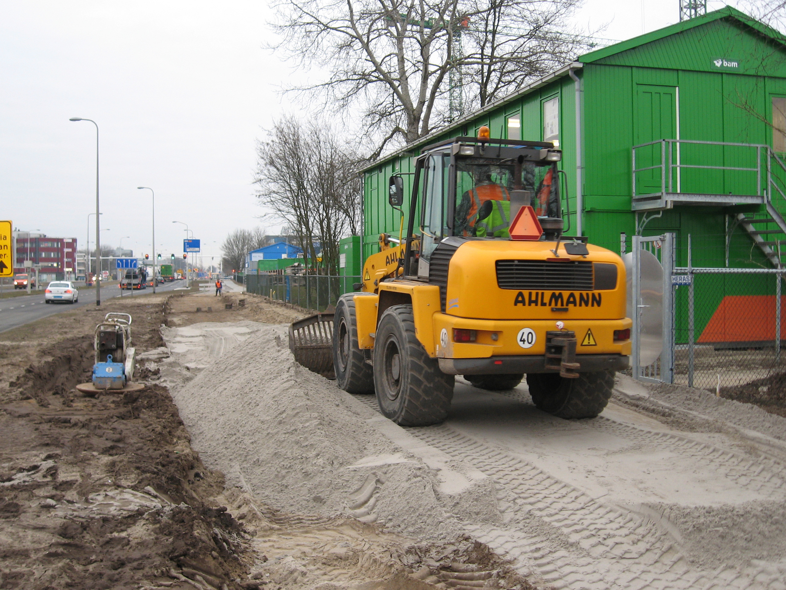 Het cunet wordt aangevuld met zand. Links in beeld staat een trilplaat.